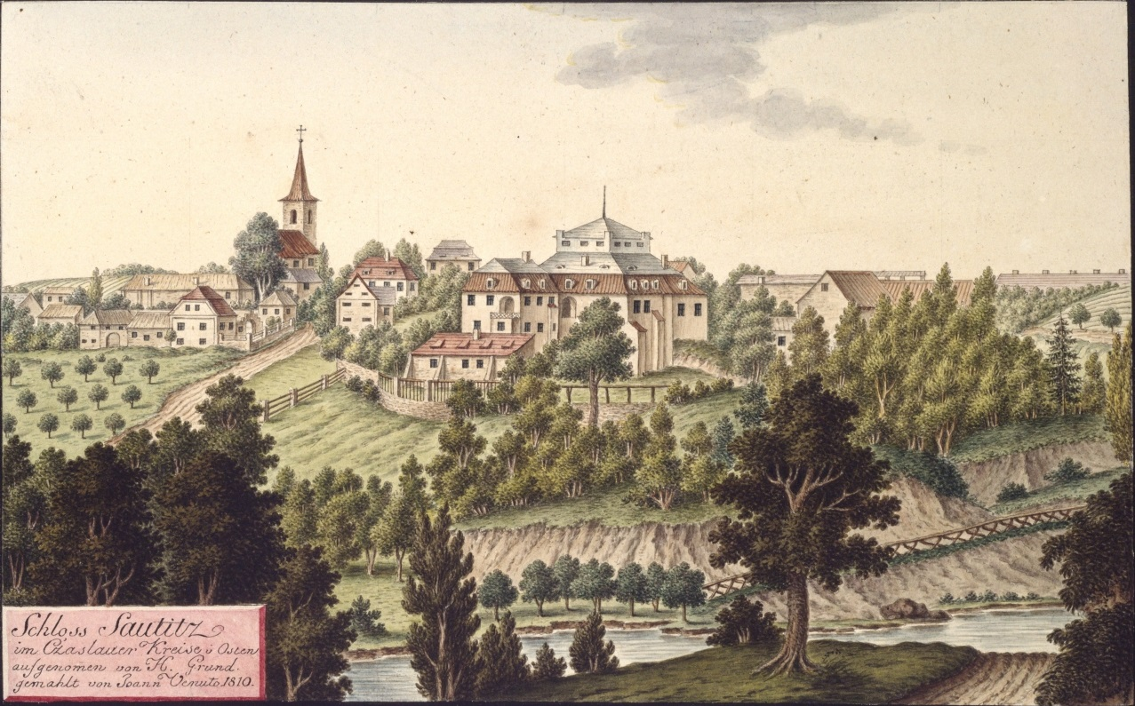 Zámek Soutice. Schloss Sautitz im Cžaslauer Kreise v. Osten aufgenommen von H. Grund. gemahlt von Joann Venuto 1810